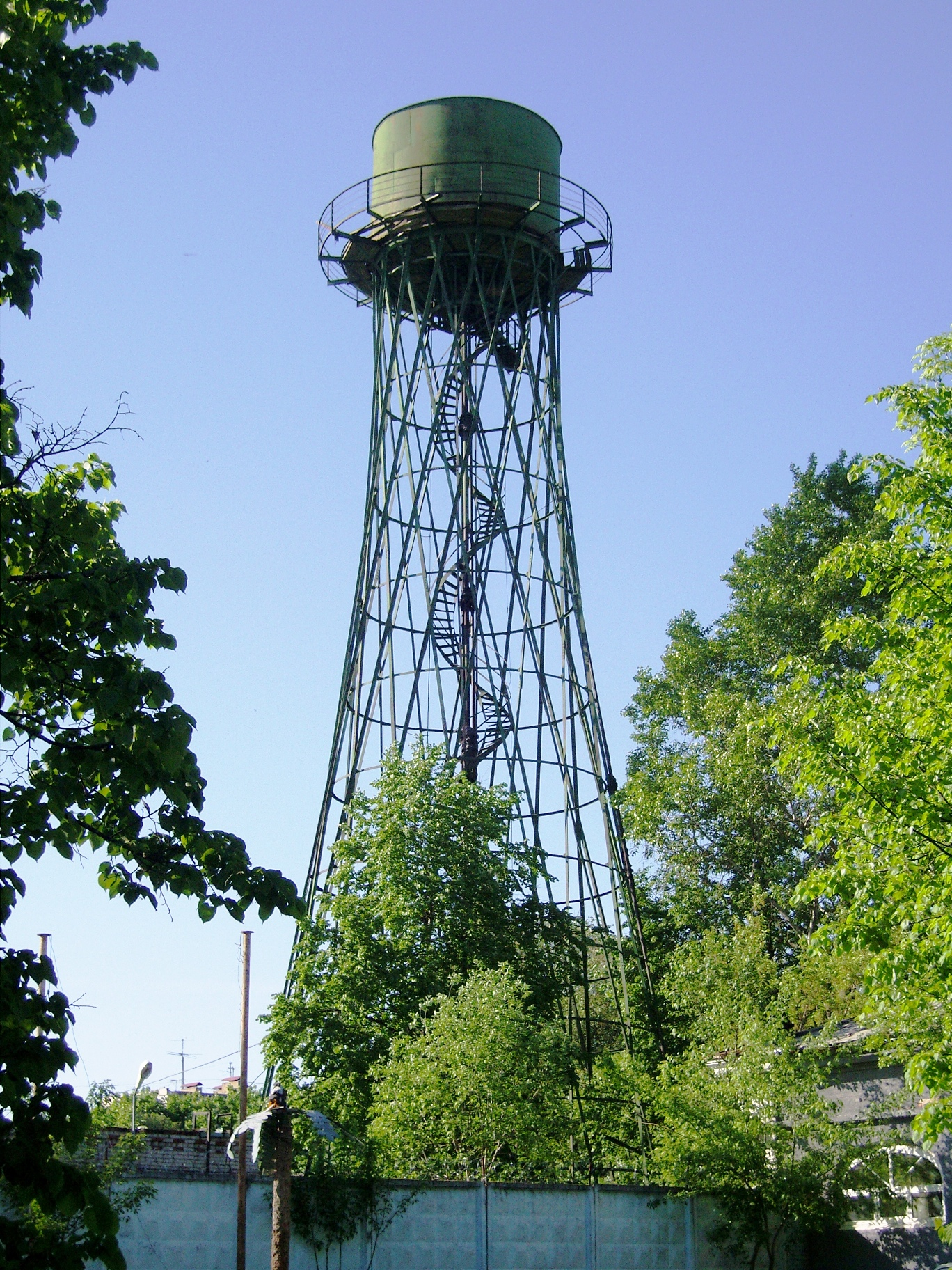 Водонапорная башня в пос. Луговая. Одна из немногих сохранивнихся башен конструкции инженера В.Шухова